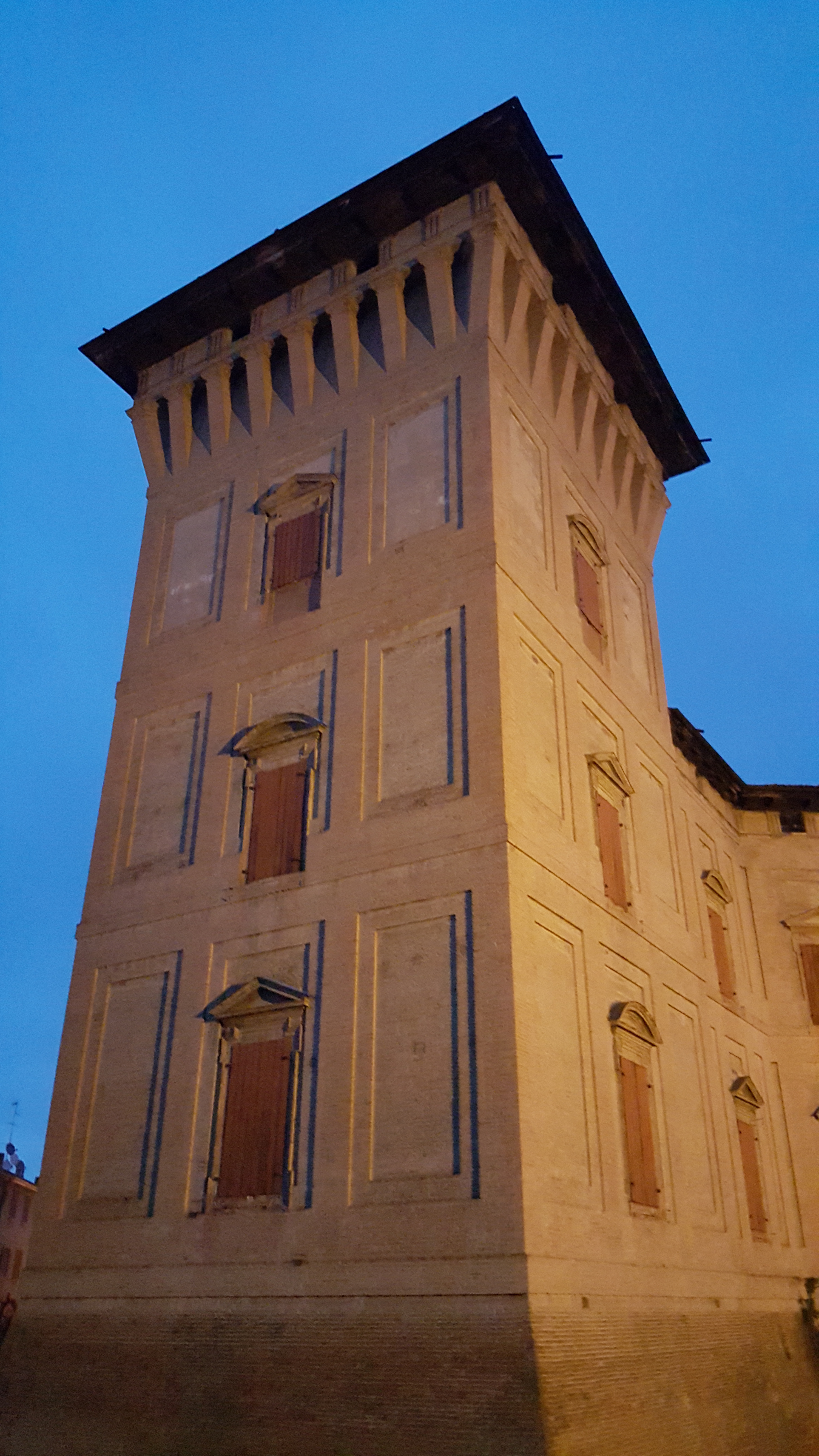 Rocca del Boiardo This is a photo of a monument which is part of cultural heritage of Italy.